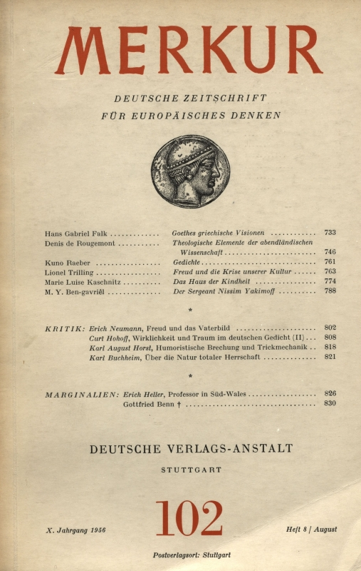 Cover der Zeitschrift Merkur, Jg. 10, Heft 8, August 1956.